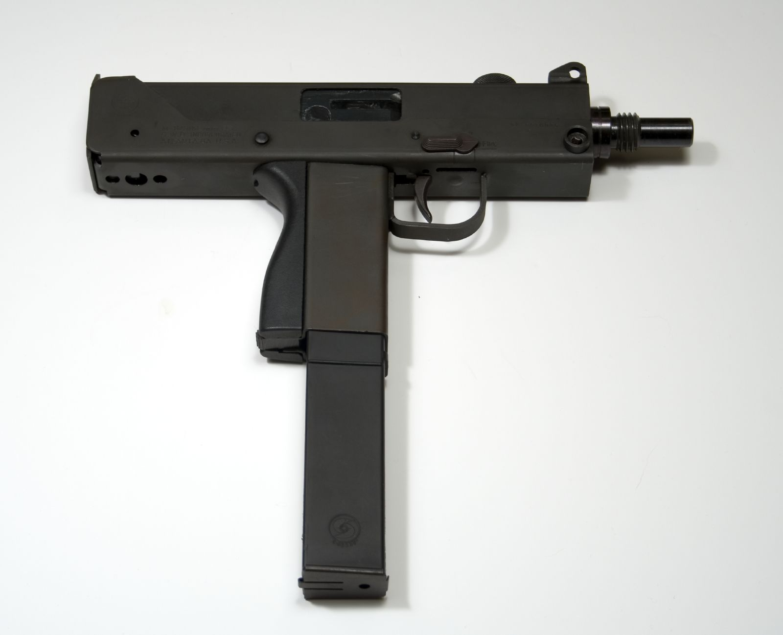 Cobray M11/9